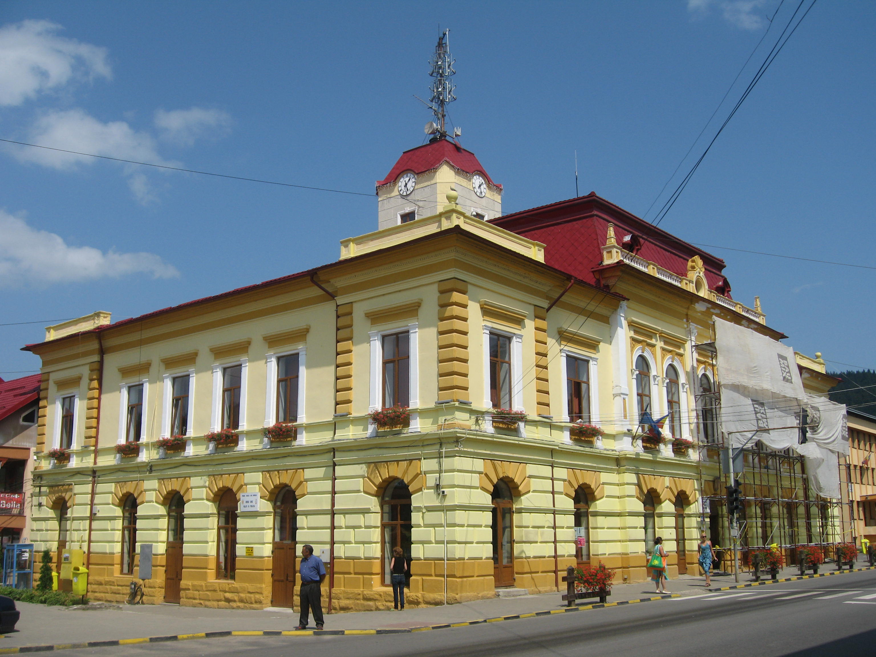 Primăria din Gura Humorului